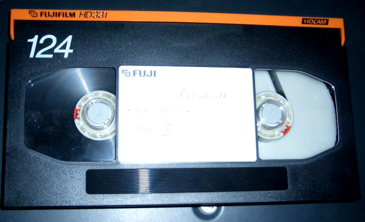 Fujifilm HDCAM tape HD331